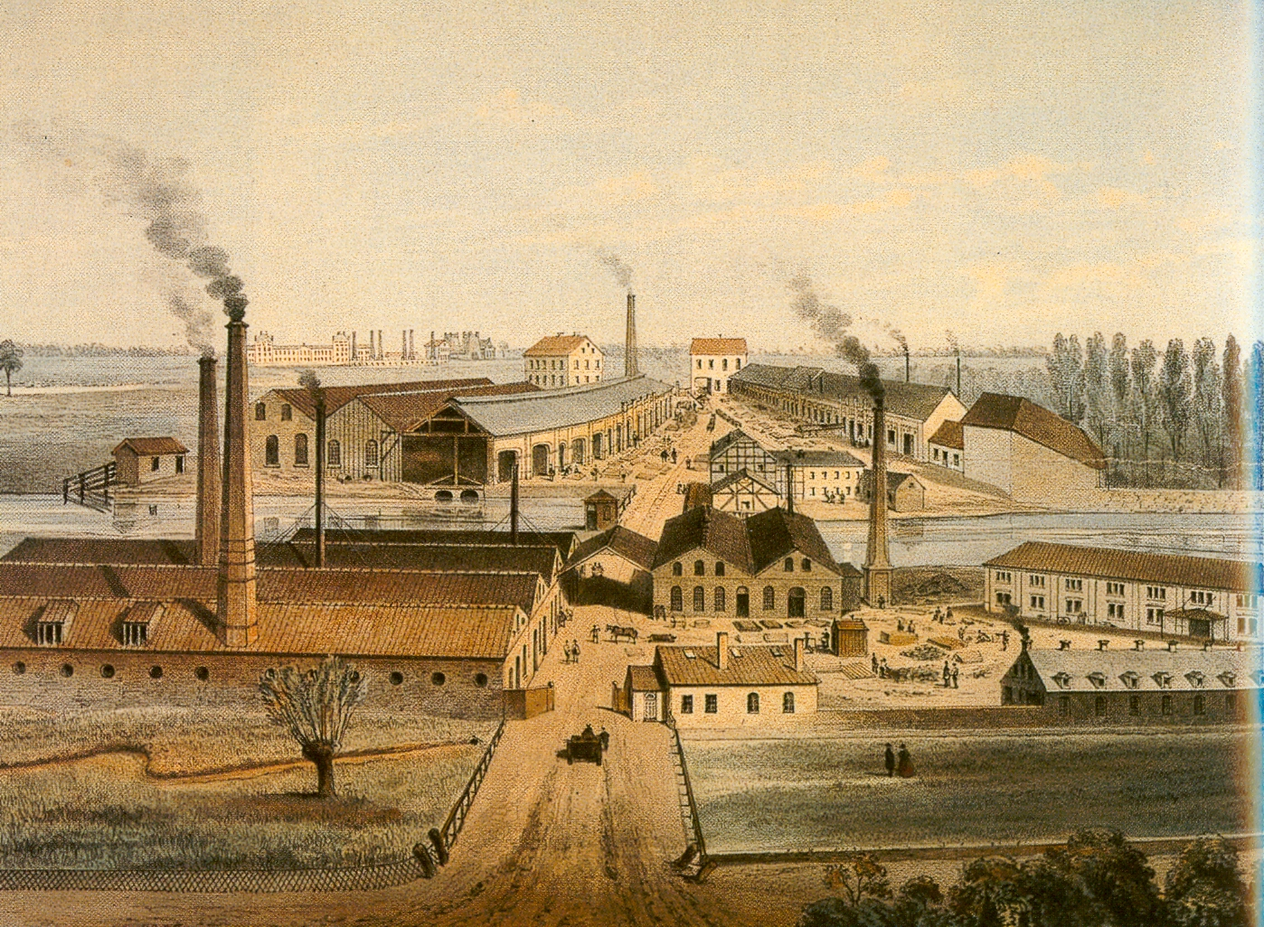 Siedlung Eisenheim Puddlingwerk, Hochöfen und Steinkohlengrube Oberhausen von Herren Jacobi, Haniel & Huyssen zu Gutehoffnungshütte bei Ruhrort Im Vordergrund die "Alte Walz"